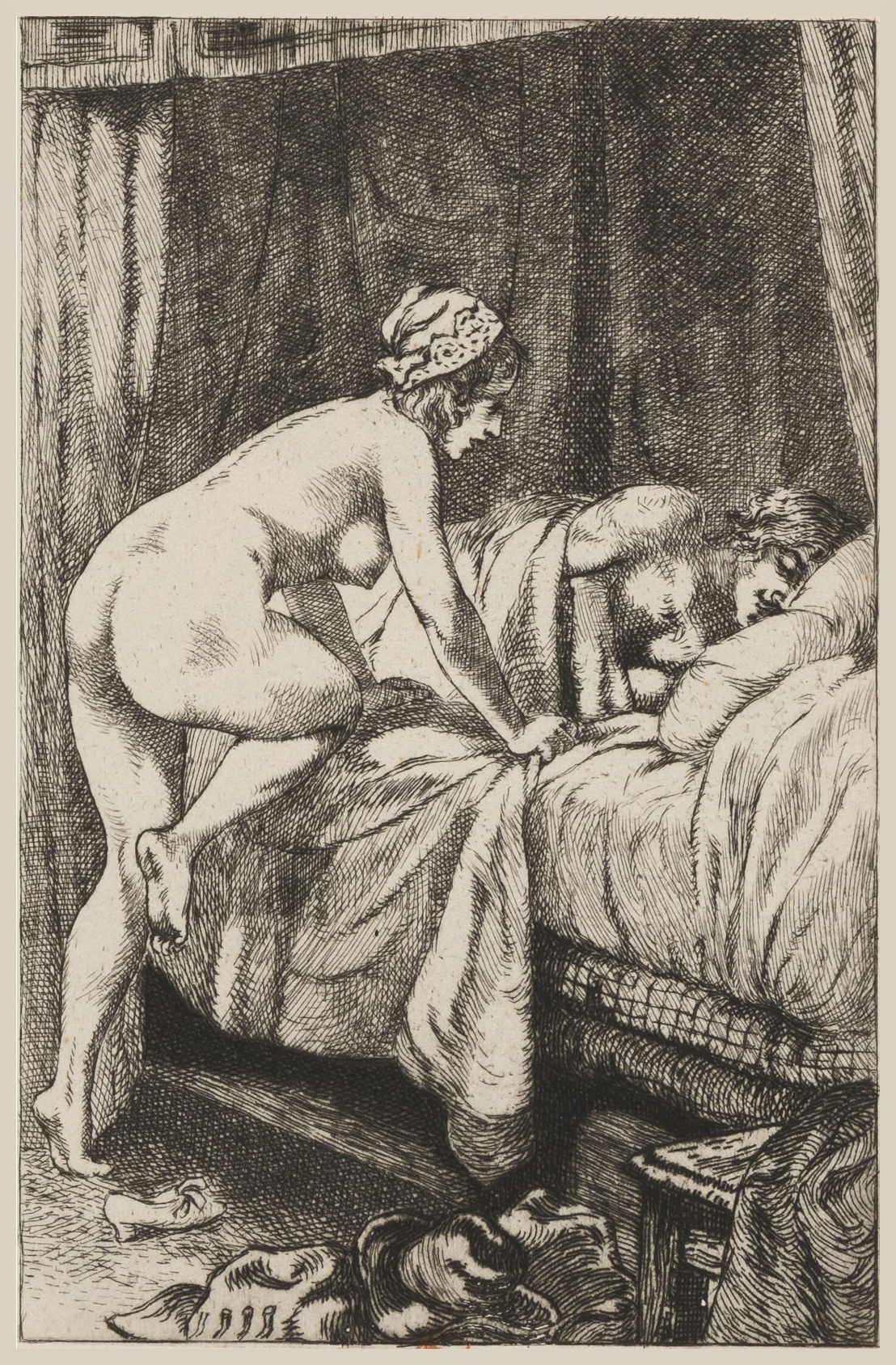 Dessins de Martin van Maele. Martin Van Maele. Illustration extraite de L'Histoire comique de Francion. En laquelle sont découvertes les plus subtiles finesses et trompeuses inventions tant des hommes que des femmes de toutes sortes de conditions et d’âges. de Charles Sorel. Jean Fort, Paris, 1925.